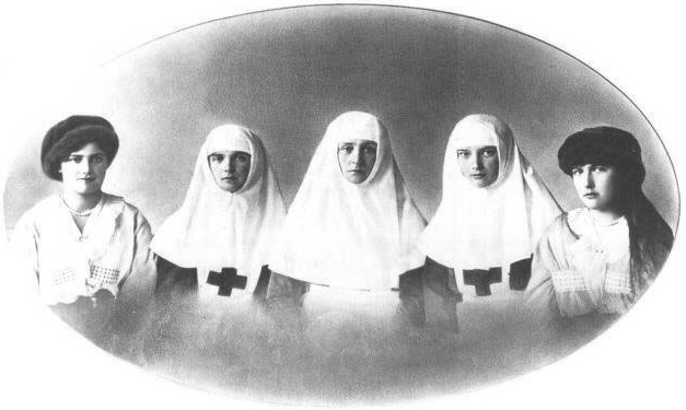 Anastasia Nikolaevna